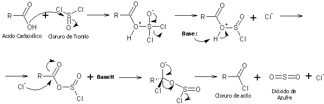 Mecanismo de reaccion Acido Carboxilico + SOCl2